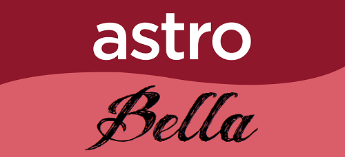 Logo saluran Astro Bella